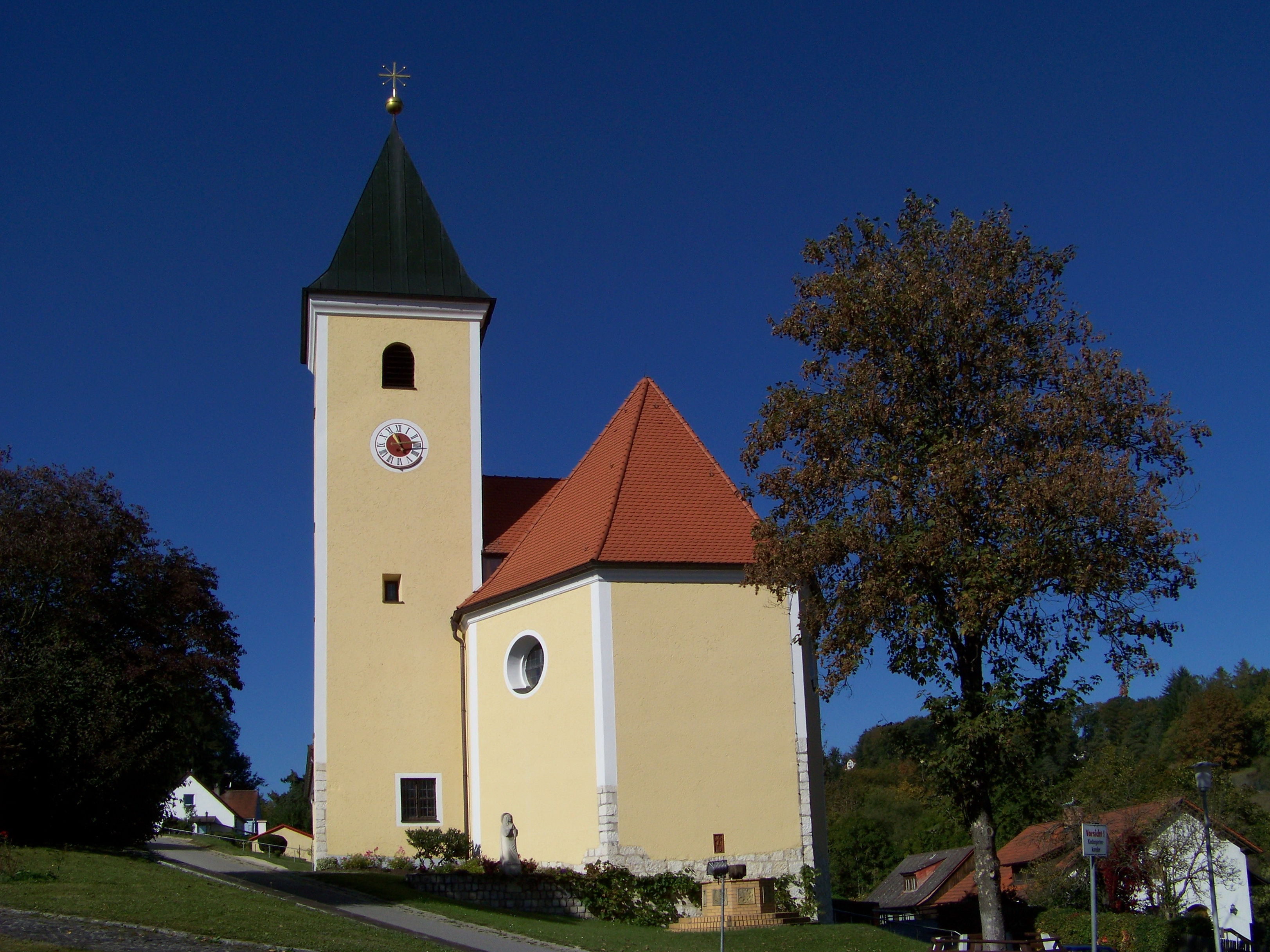 Nittendorf, Etterzhausen, Kirchbergstraße 9. Kath. Expositurkirche St. Michael. Gestelzter Saalbau mit abgewalmtem Satteldach, Flankenturm mit Spitzdach, 1937/38 von Franz Günthner; mit Ausstattung.